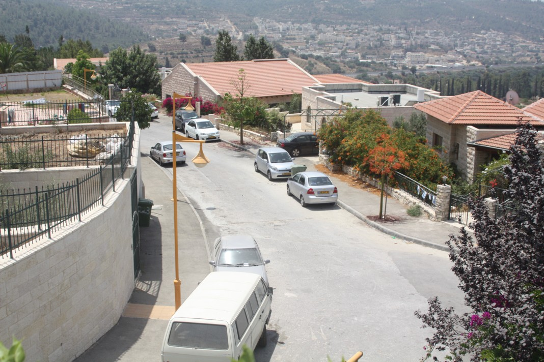 Beit Nekofa בית נקופה